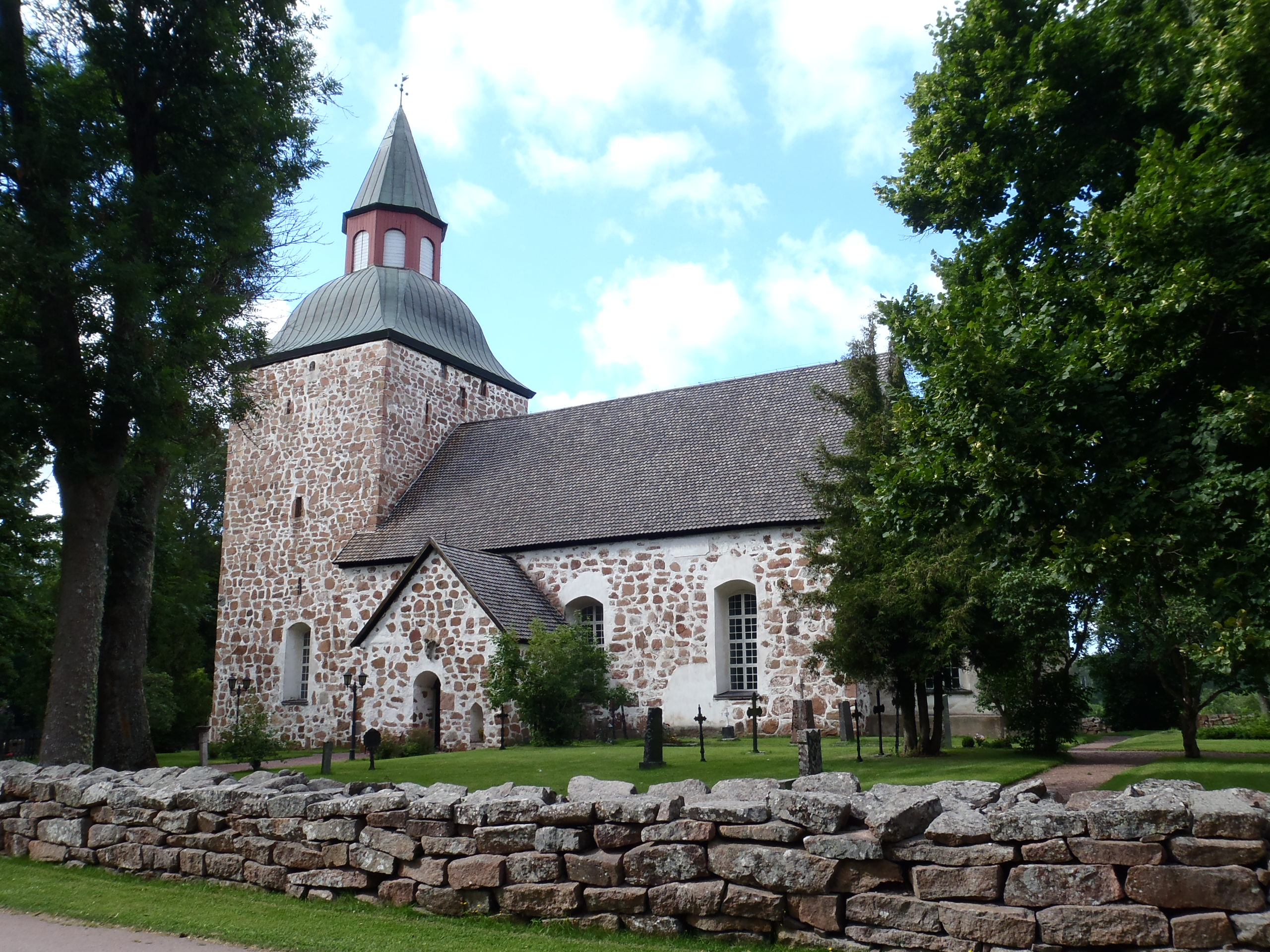 Saltviks kyrka på Åland.